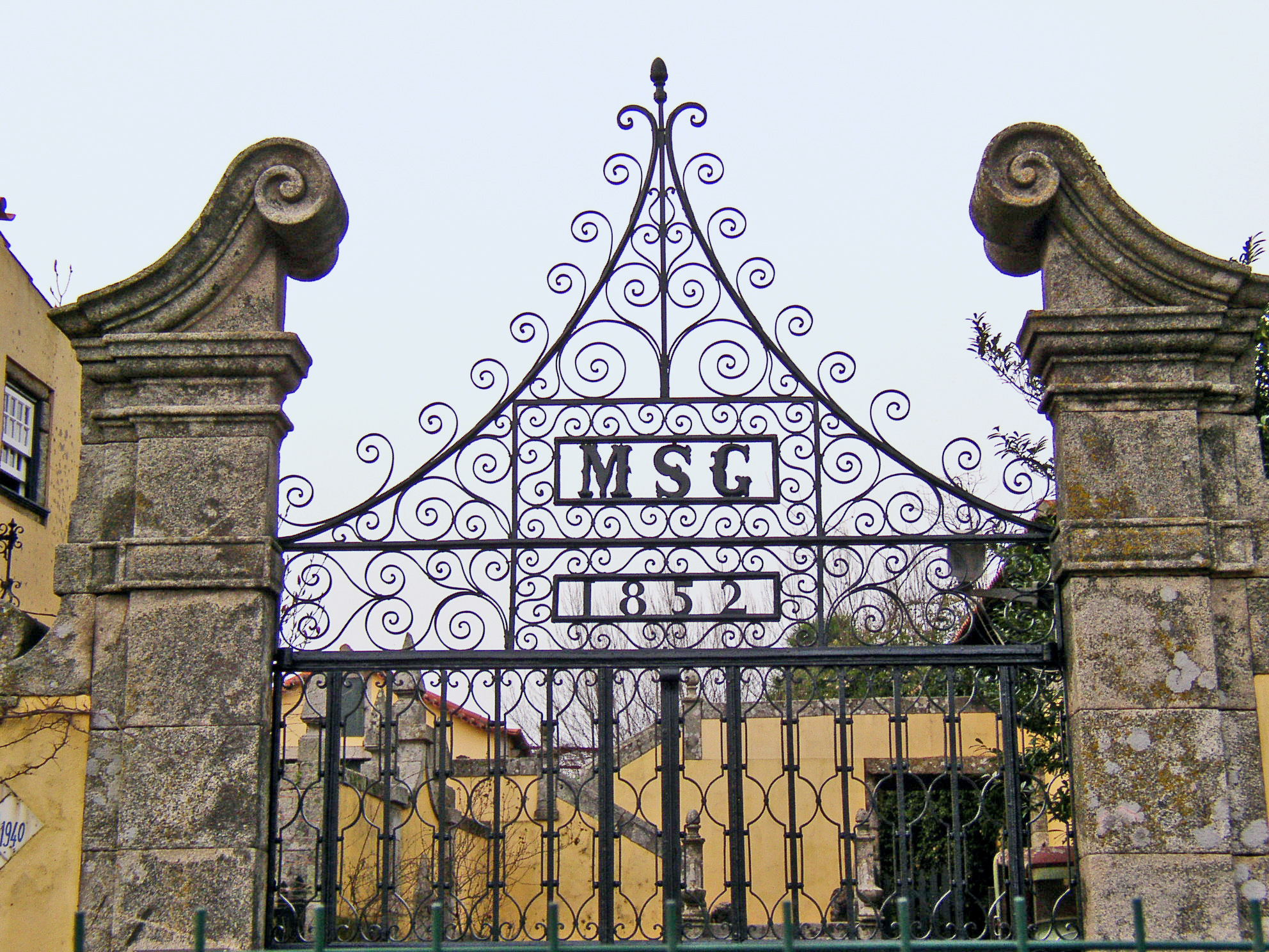 Quinta do Viso ou Casa da Quinta do Rio (Portugal). This file was uploaded for Wiki Loves Monuments in Portugal with the unique identifier 73705.